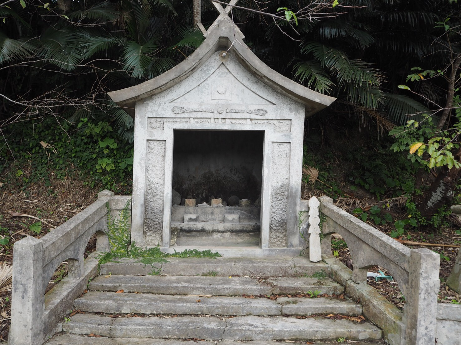 沖縄県名護市嘉陽区の上城の拝所